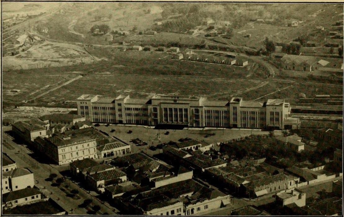 Vista da recém construída estação Bauru